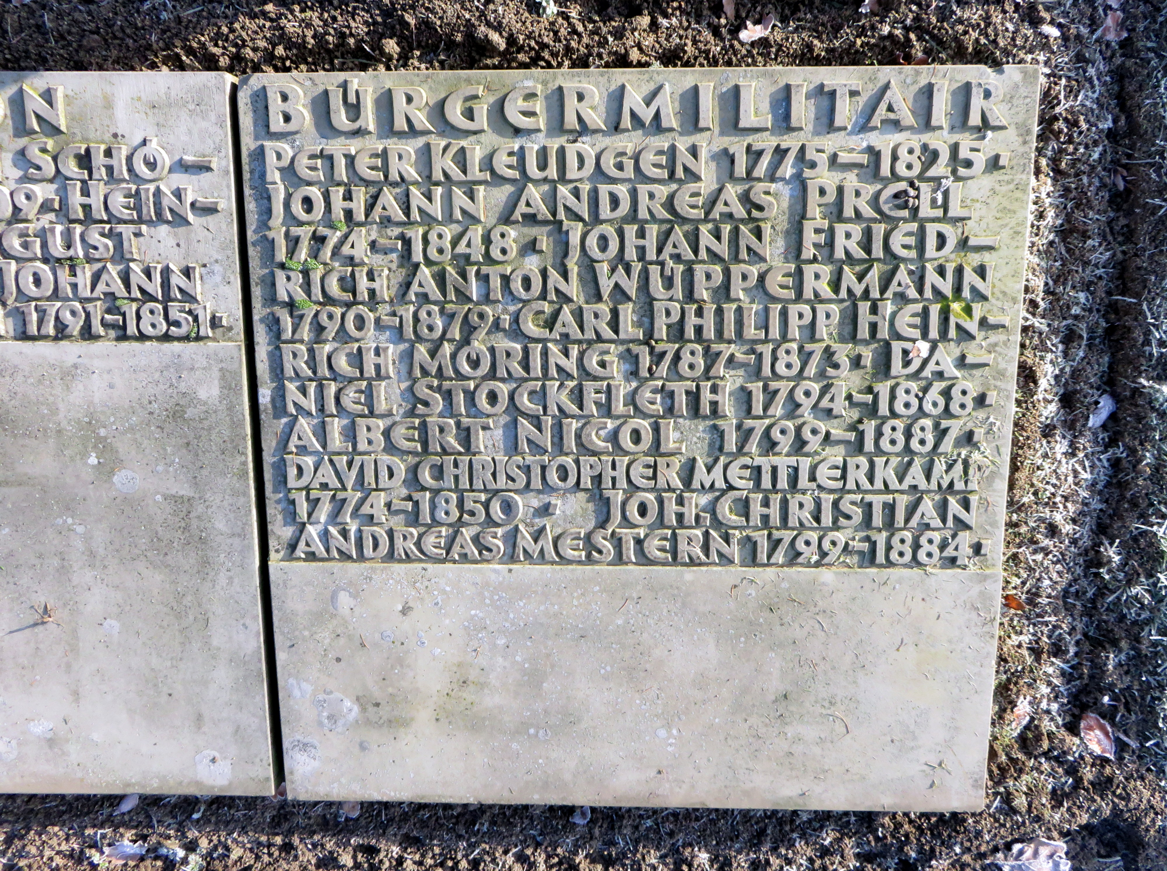 Inschrift auf dem Sammelgrabmal Bürgermilitair zu Ehren des Hamburger Freiheitskämpfers David Christopher Mettlerkamp während der Napoleonischen Kriege, Bereich Althamburgischer Gedächtnisfriedhof, Hamburger Friedhof Ohlsdorf, oberhalb der südwestlichen Querachse.